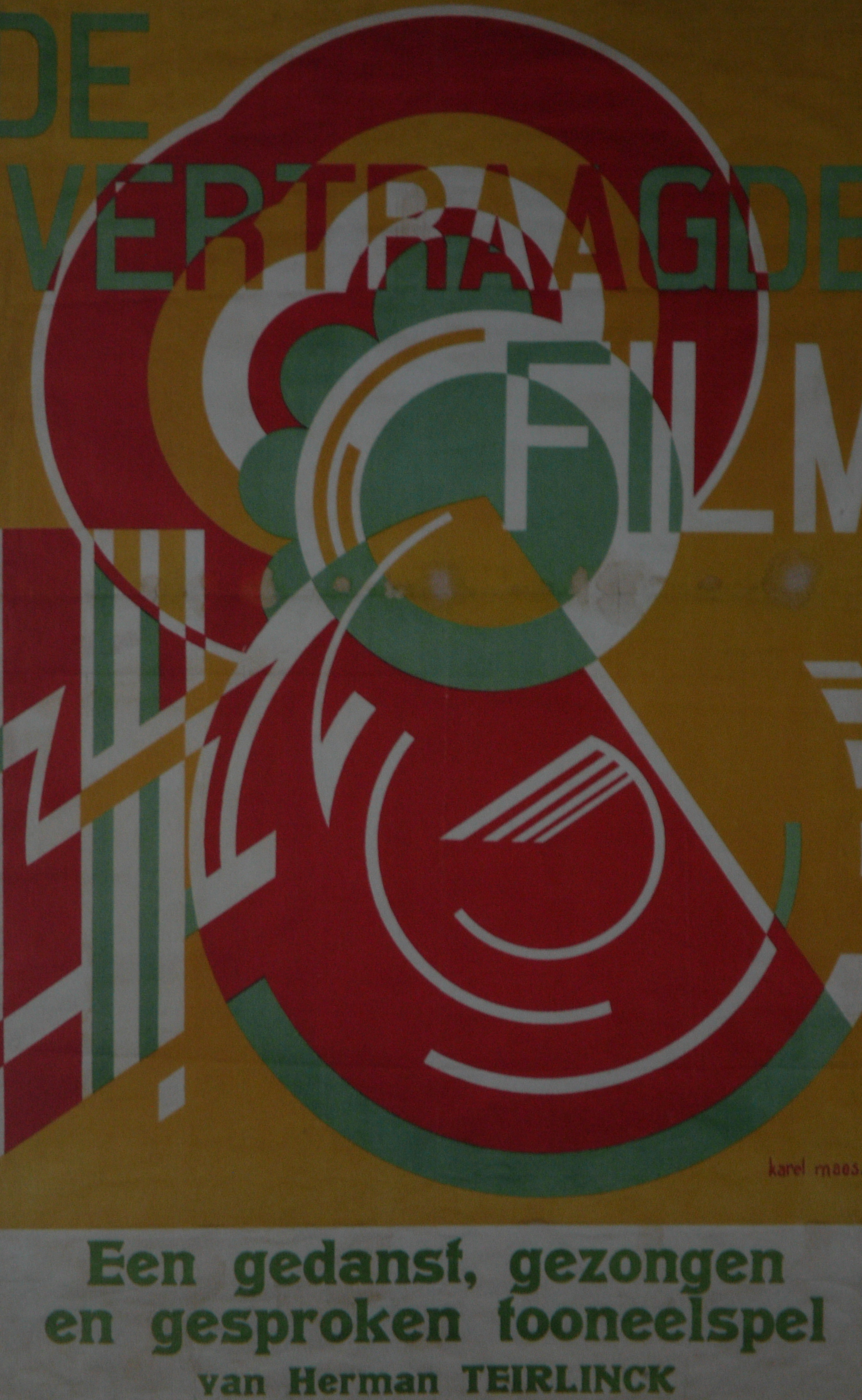 Affichte voor De vertraagde film, 1922. 135x79 cm Litho op papier